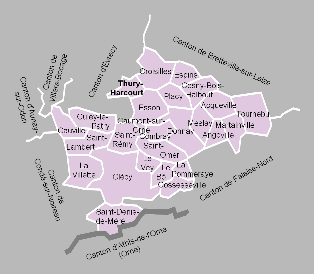 Carte du canton de Thury-Harcourt en 2012.